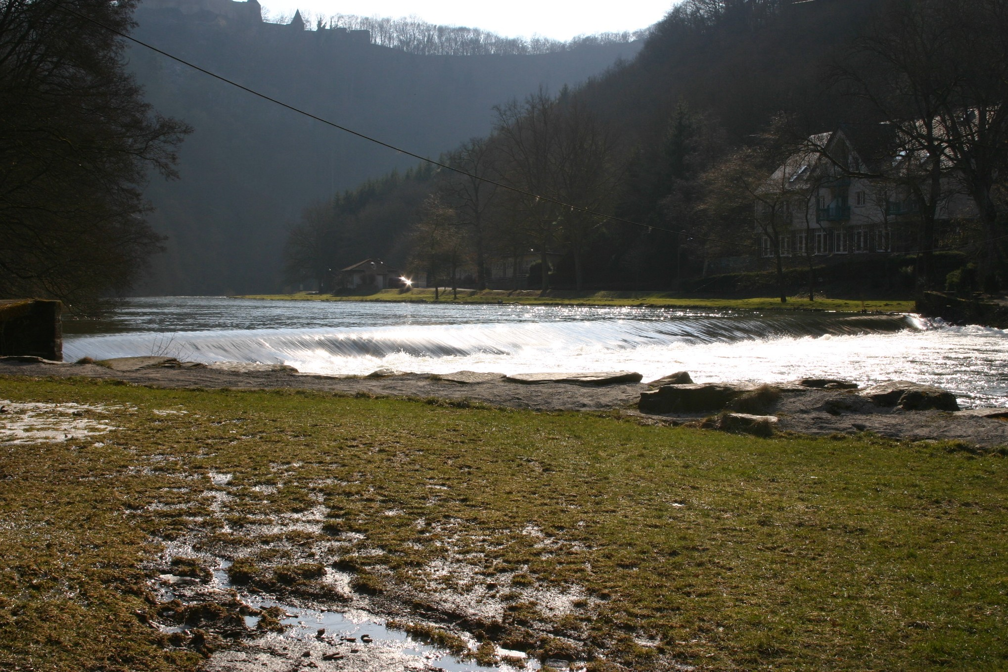 La Sûre à la Plage de Bourscheid Beideler René